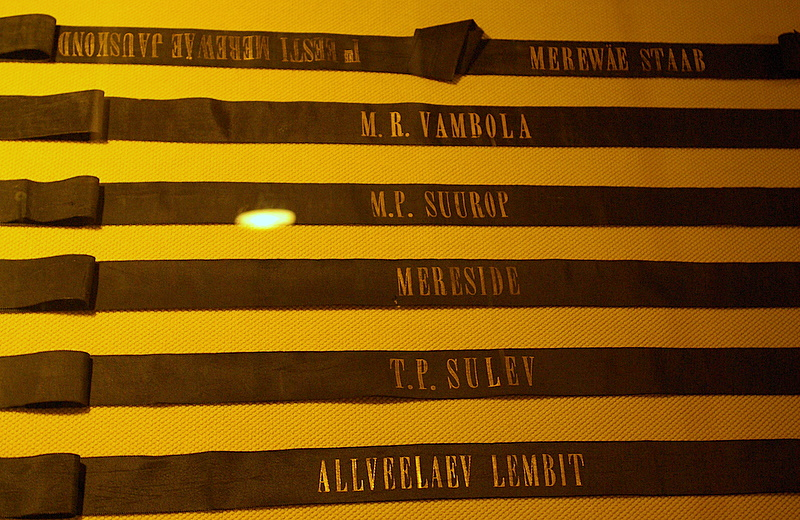 Eesti Vabariigi mereväevormi madrusemütsi linte laevade nimedega. Ajaloomuuseumi arhiivist.